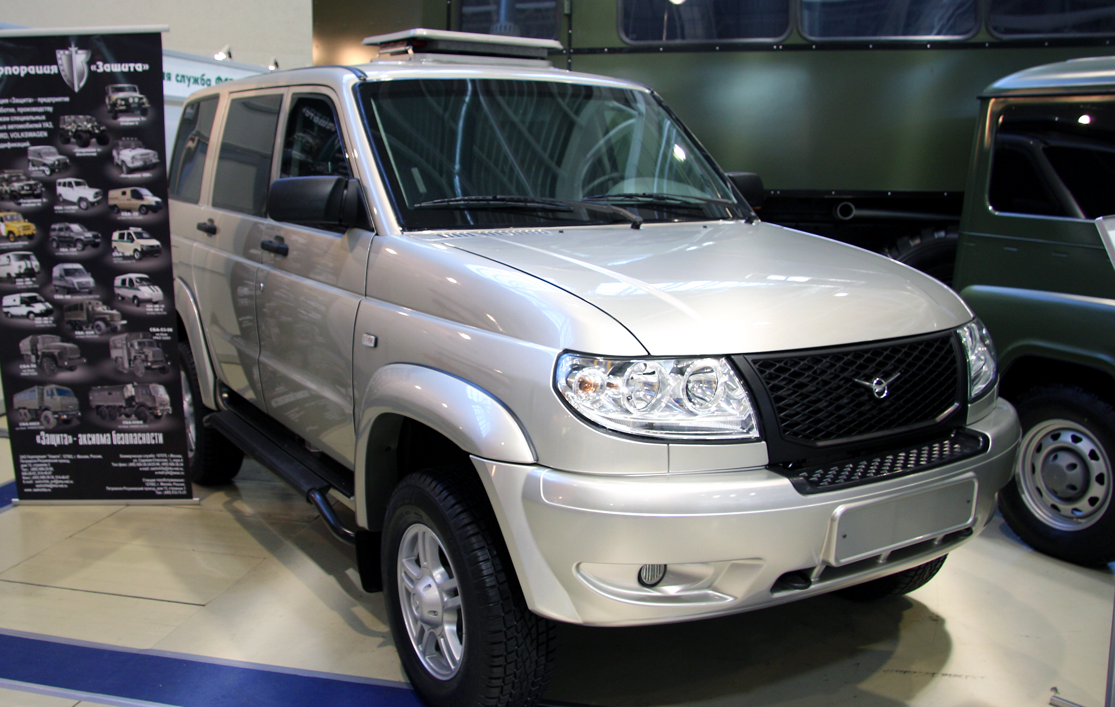 СБА 10У на базе УАЗ Патриот (SBA 10U on UAZ Patriot base)